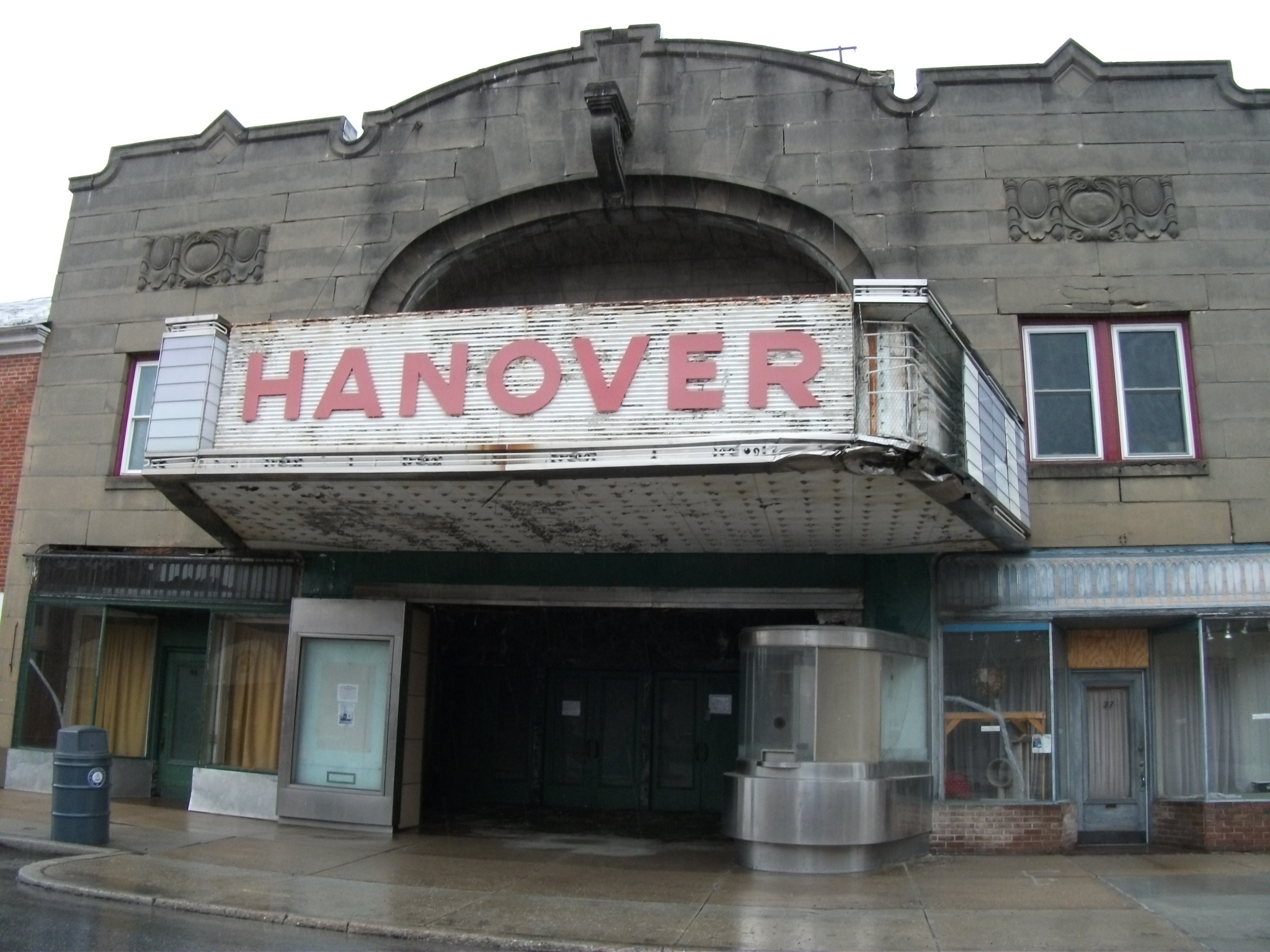 Hanover, Pennsylvania